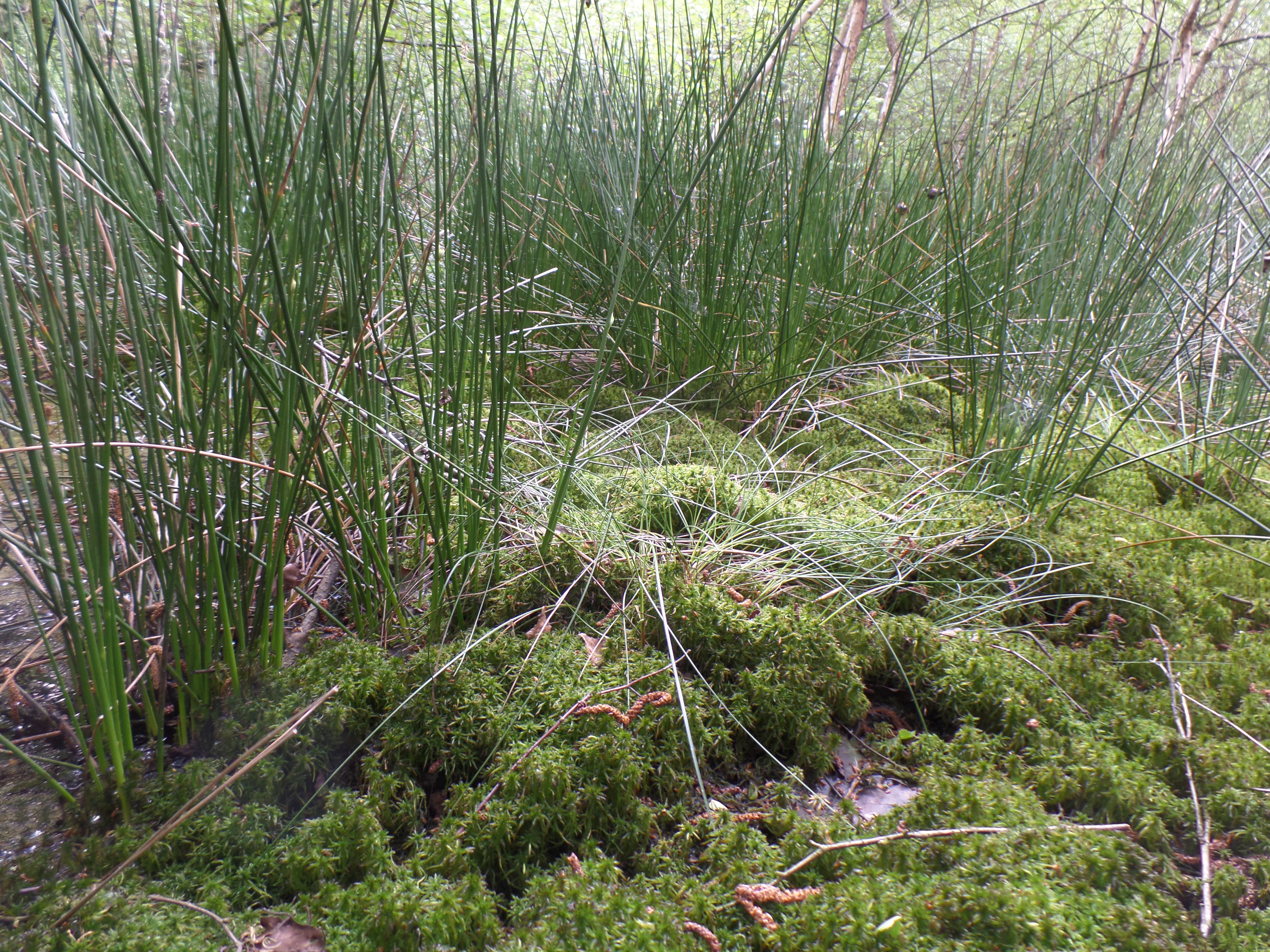 Typische Vegetation im Naturschutzgebiet Dievenmoor (NSG WE 218)